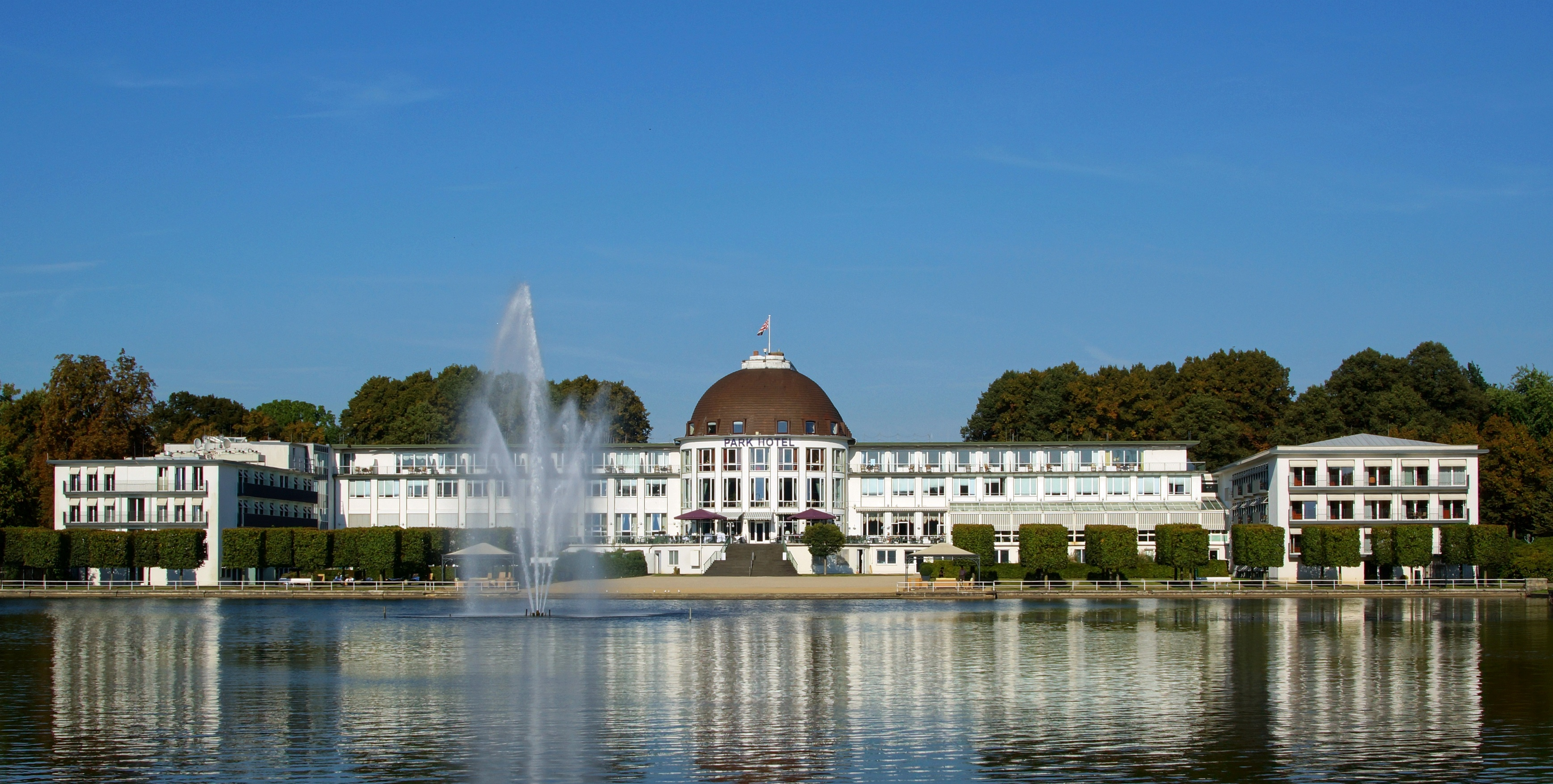 Parkhaus, Parkhotel in Bremen,Das abgebildete Objekt ist ein geschütztes Kulturdenkmal in der Freien Hansestadt Bremen, mit der Nr. 0218,T001 beim Landesamt für Denkmalpflege registriert.